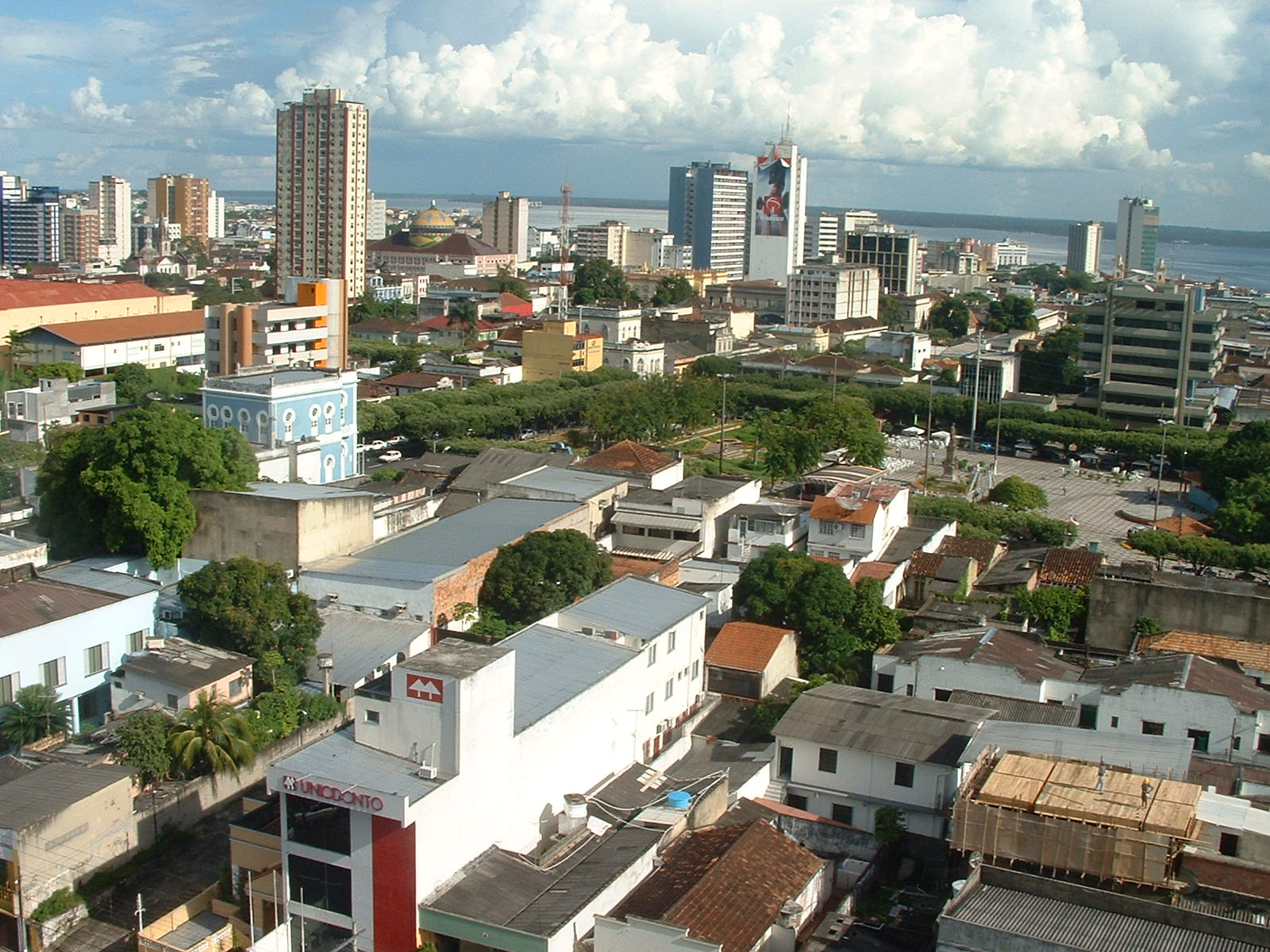 Manaus downtown: Praça da Saudade, Teatro Amazonas. Background: Rio Negro